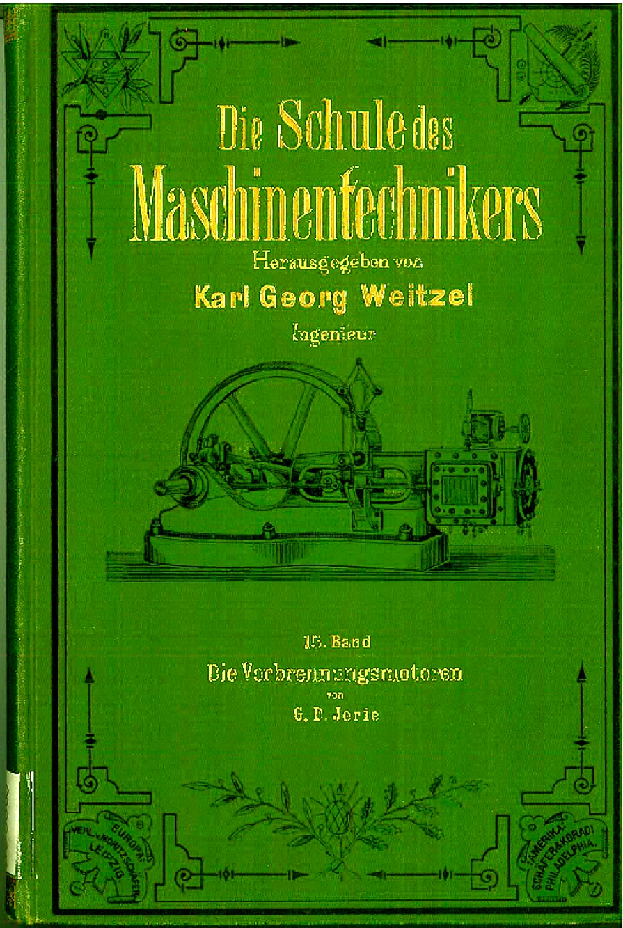 Titelblatt: Schule des MT